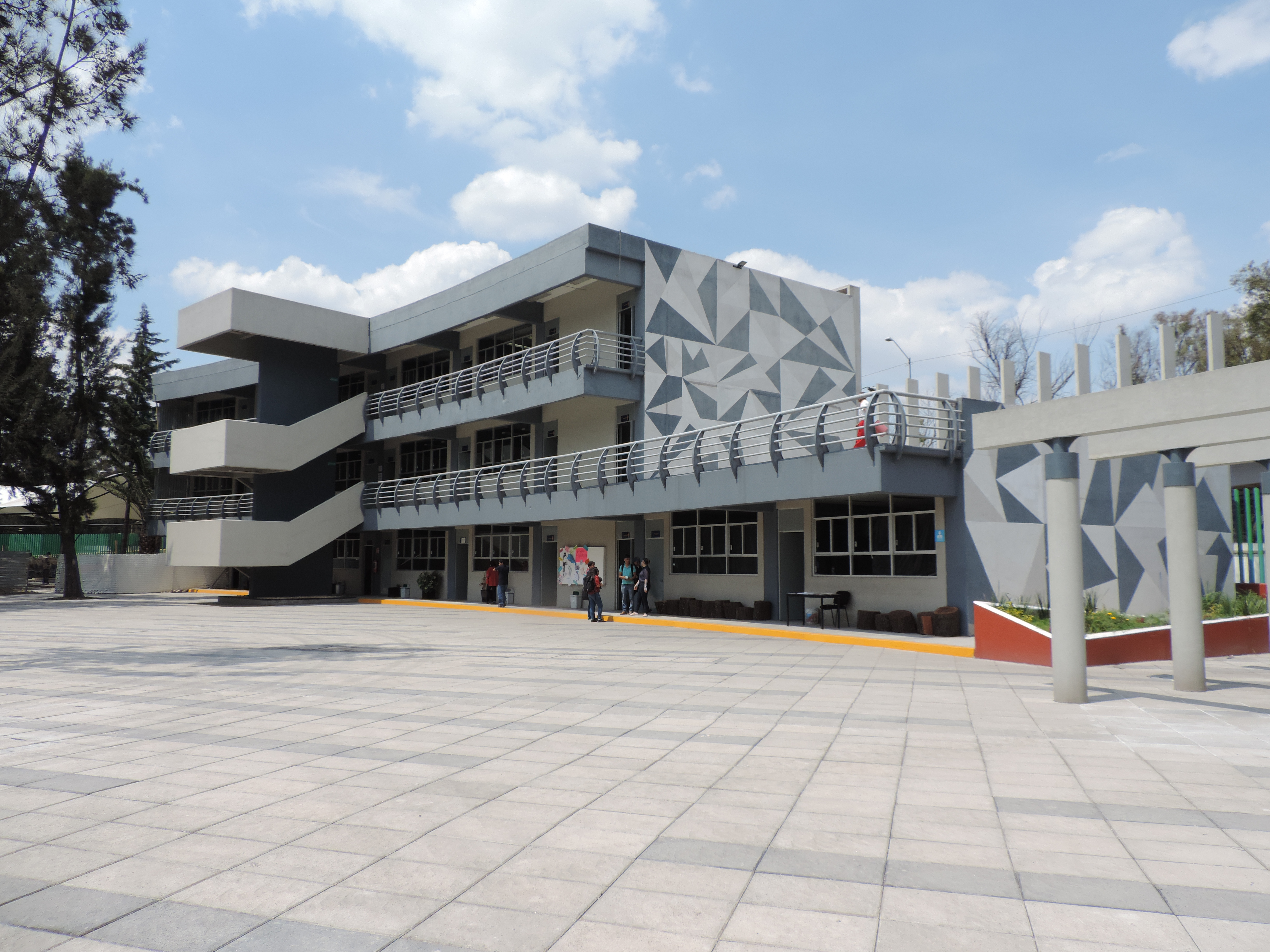 Vista lateral del Edificio A del IRC unidad académica GAM, con el mural de polígonos grises